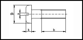 ISO 1580